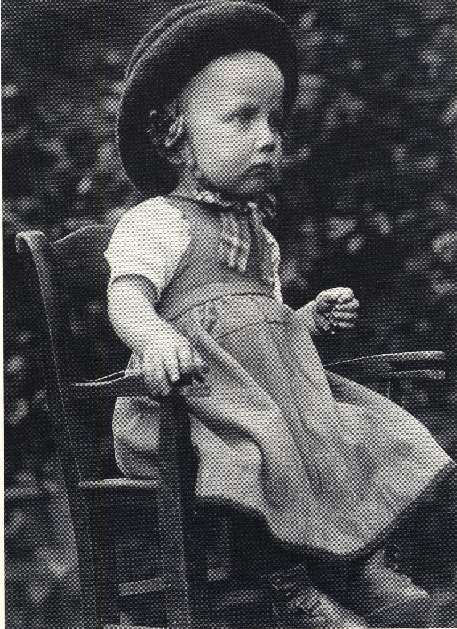 Kind mit Fallhut, Westmünsterland